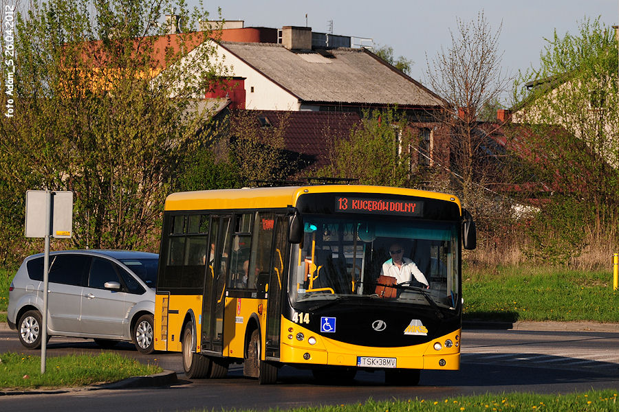 Jelcz Libero w Skarżysku-Kam.